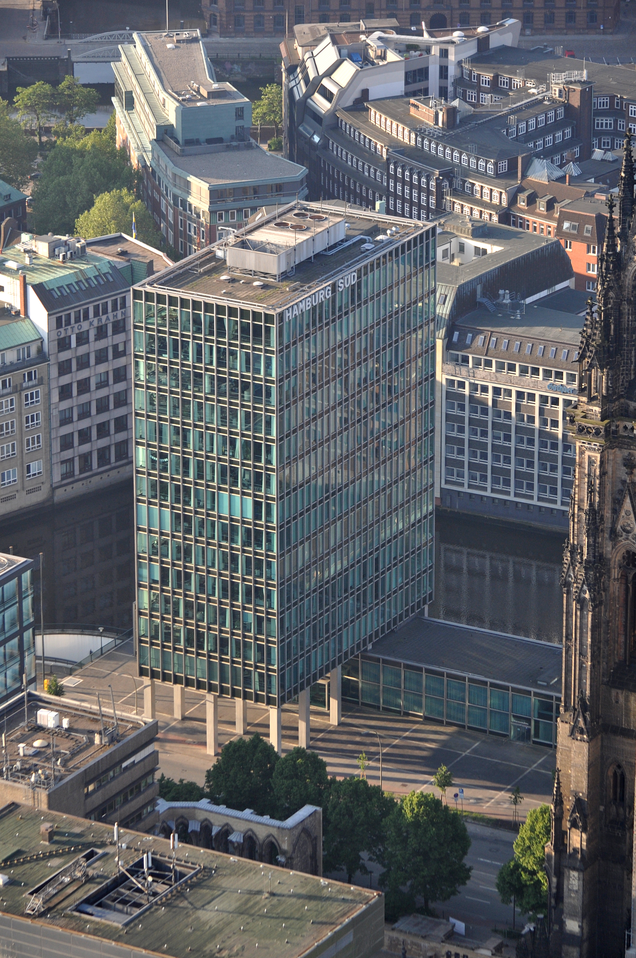 Verwaltungsgebäude der Reederei Hamburg-Süd in Hamburg-Altstadt. This is a photograph of an architectural monument.